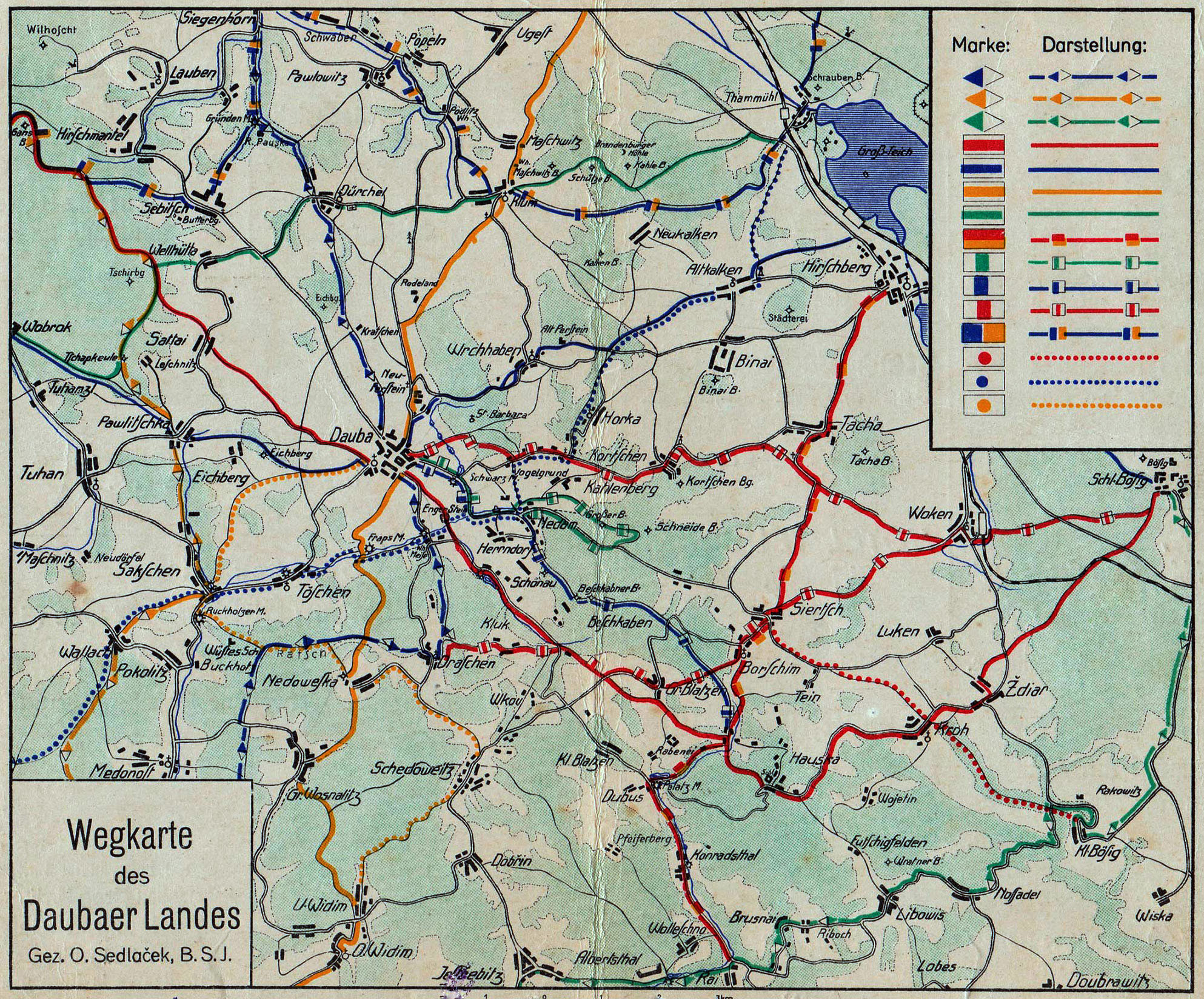 Alte Wanderkarte der Daubaer Schweiz von O. Sedlaček (um 1930) mit den drei Varianten des Rautenweges